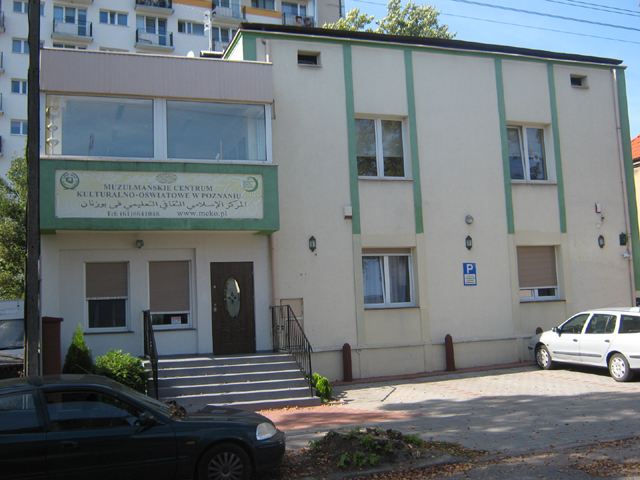 Budynek poznańskiego meczetu należący do Muzułmańskiego Centrum Kulturalno-Oświatowego w Poznaniu